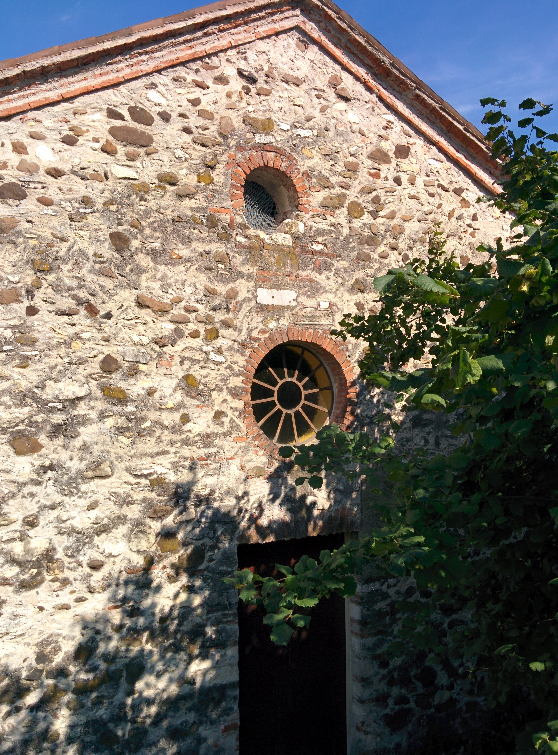 Facciata della chiesa di San Lorenzo a Castelnovo di Isola Vicentina, in provincia di Vicenza.